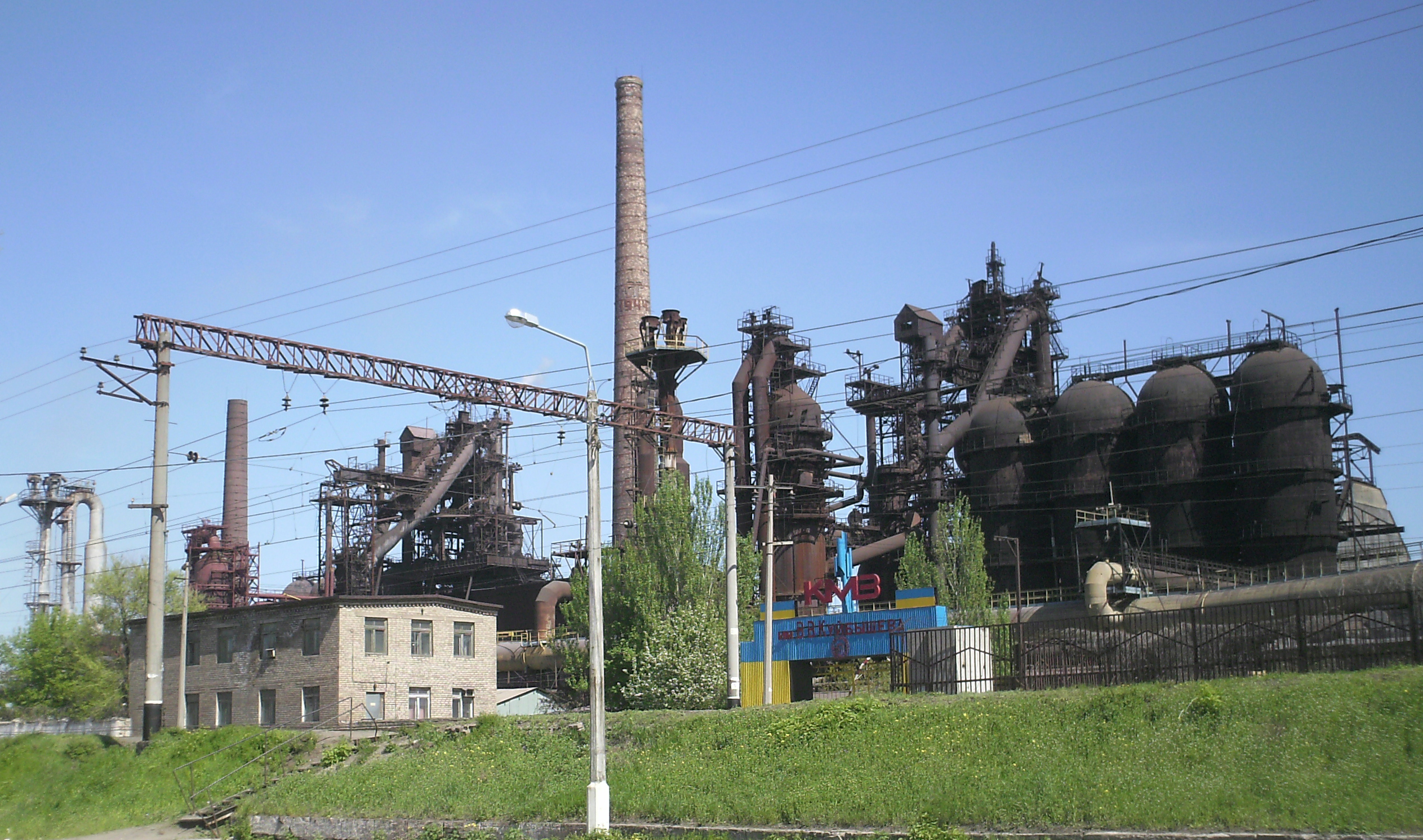 Прохідні Краматорського металургійного заводу з боку залізниці.